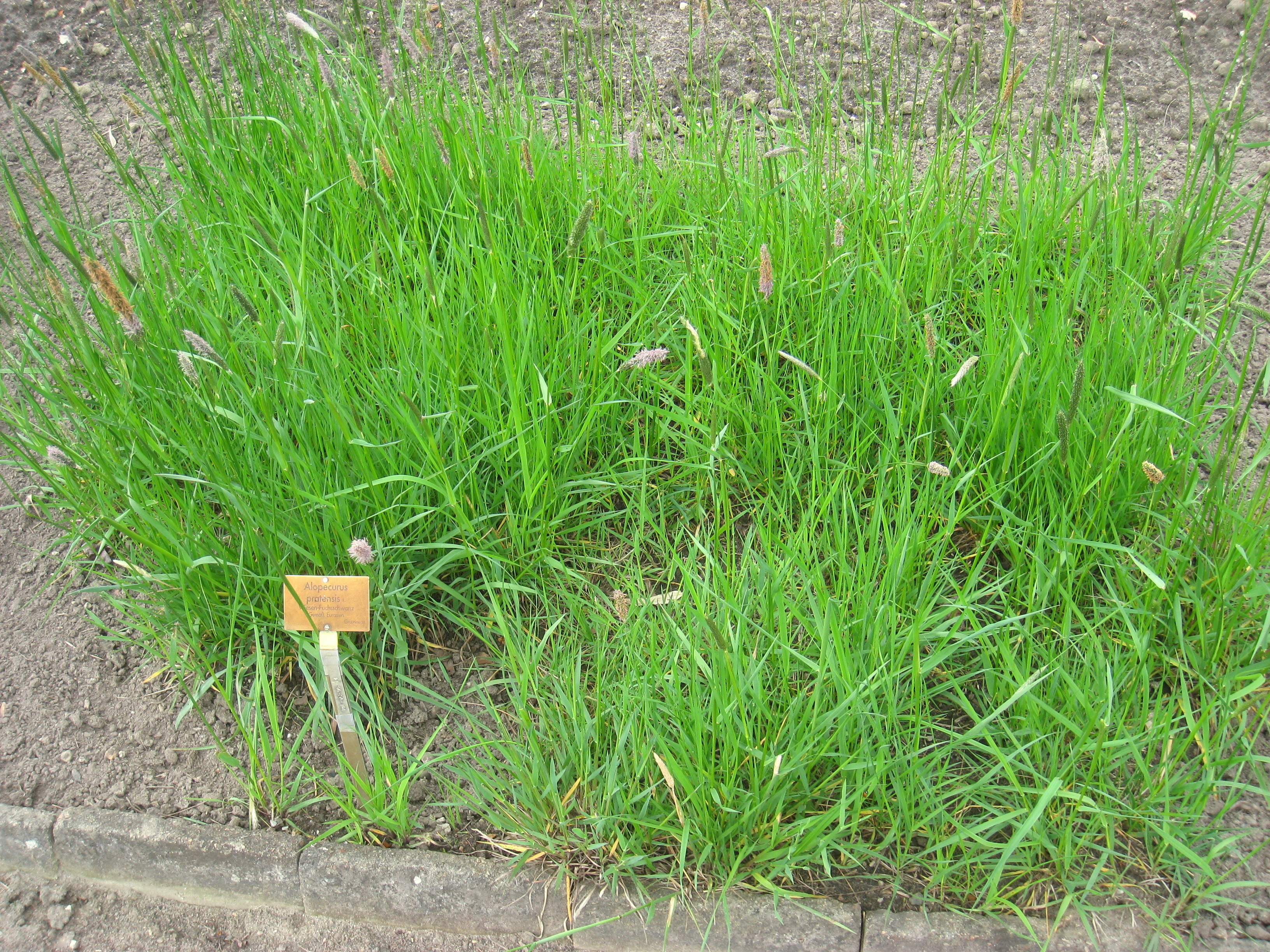 Alopecurus pratensis specimen in the Botanischer Garten, Berlin-Dahlem (Berlin Botanical Garden), Berlin, Germany.